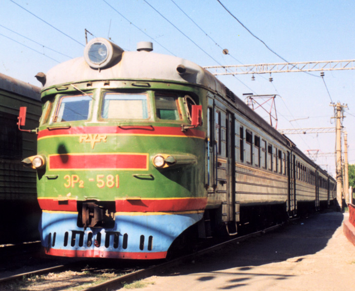 Электропозезд ЭР2-581 в Волгограде